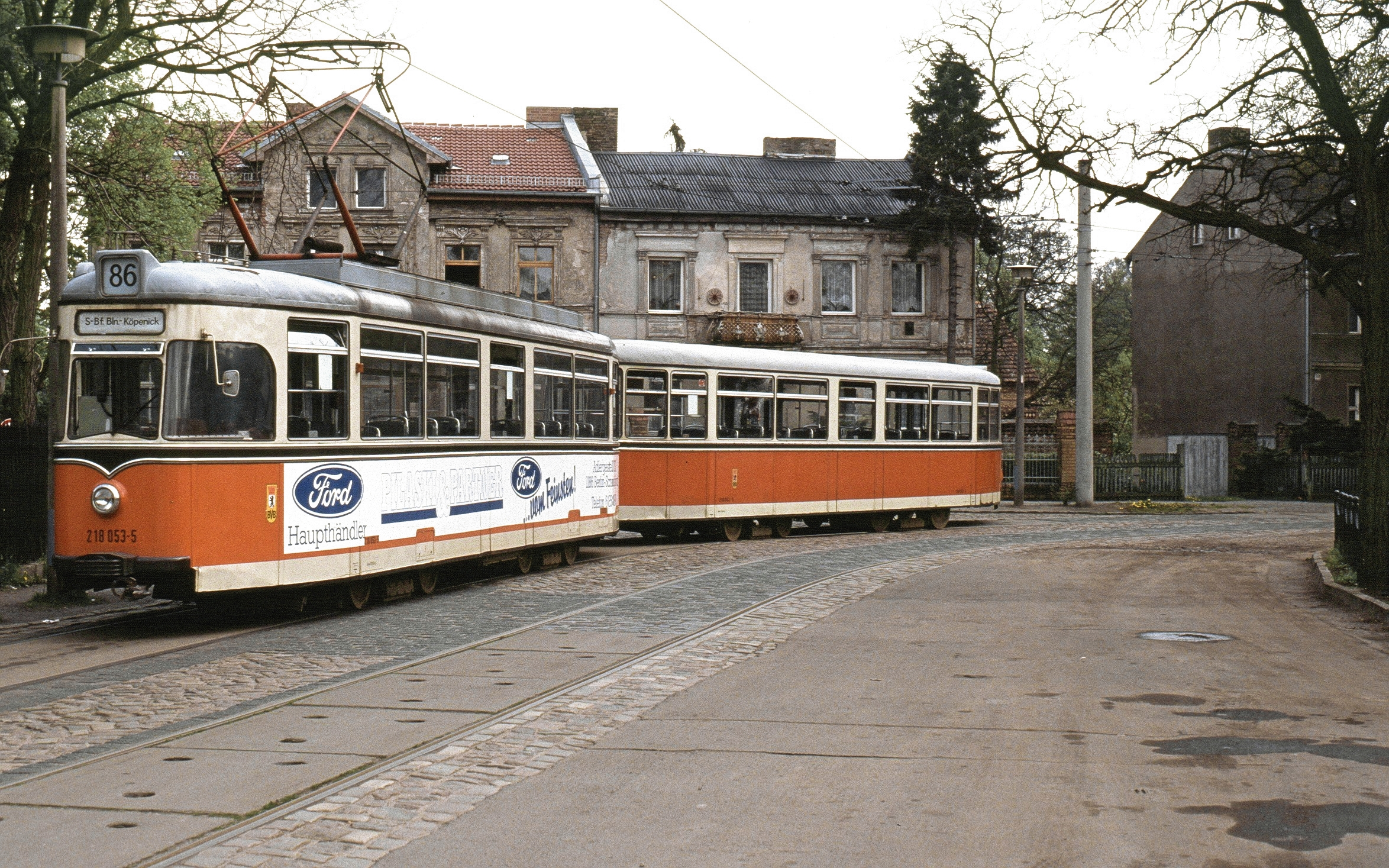 Großraumzug Endschleife Schmöckwitz